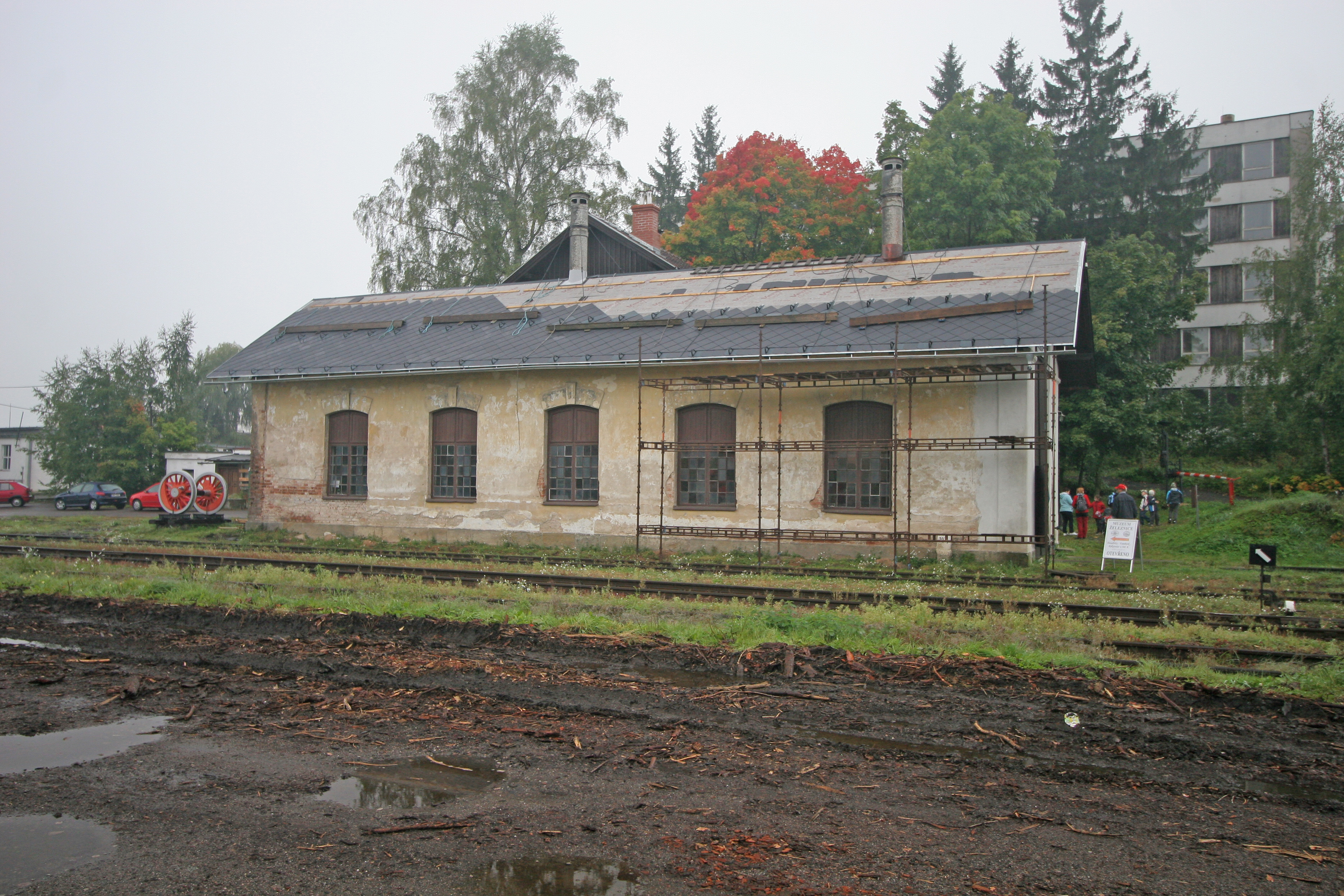 Depo - výtopna parních lokomotiv se studnou (Rokytnice v Orlických horách), Rokytnice v Orlických horách